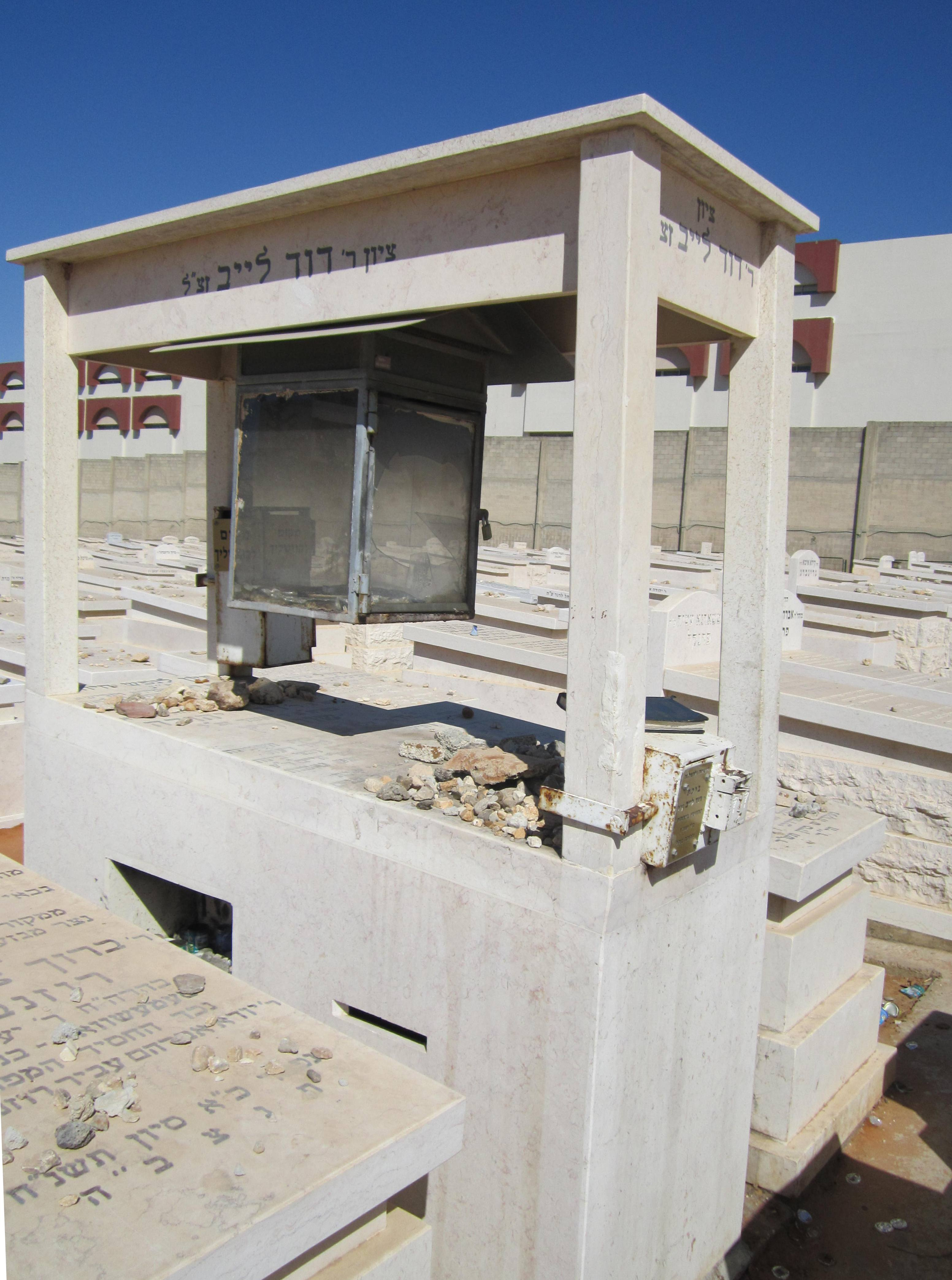 מצבת ר' דוד לייב